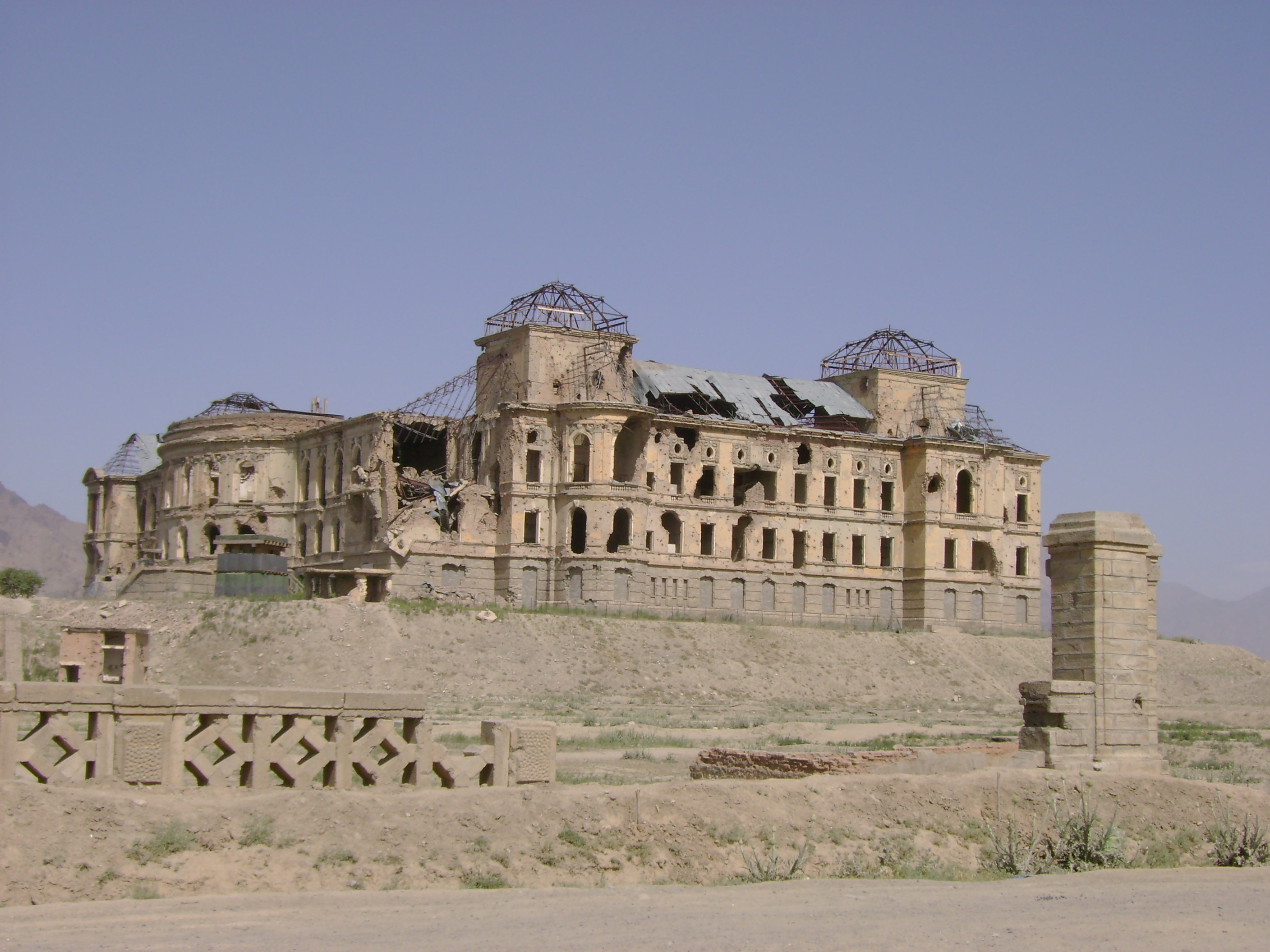 Königspalast